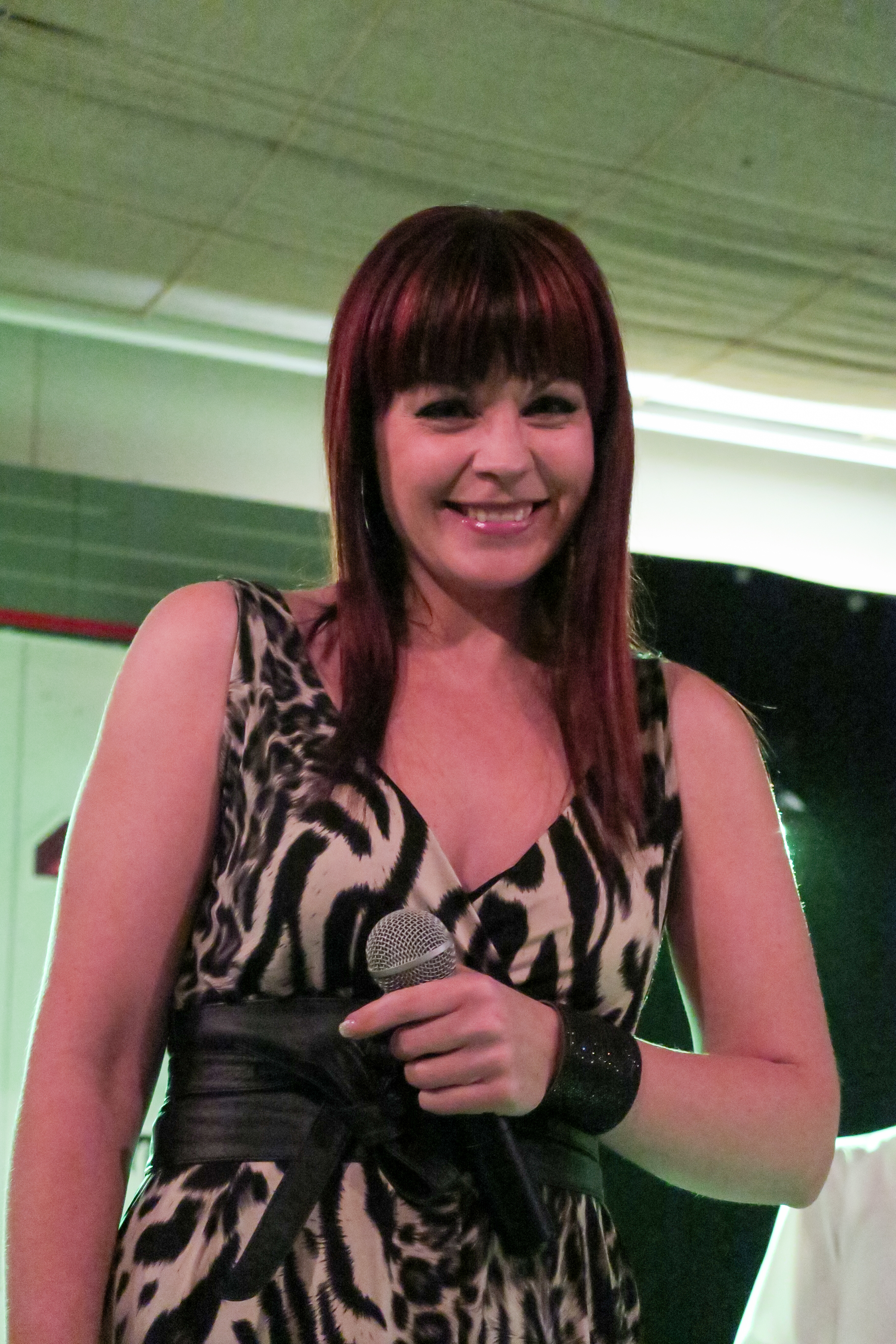 Piritta Venho suomalainen laulaja